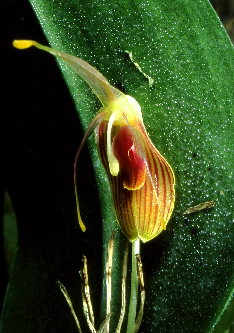 Restrepia flosculata - flower